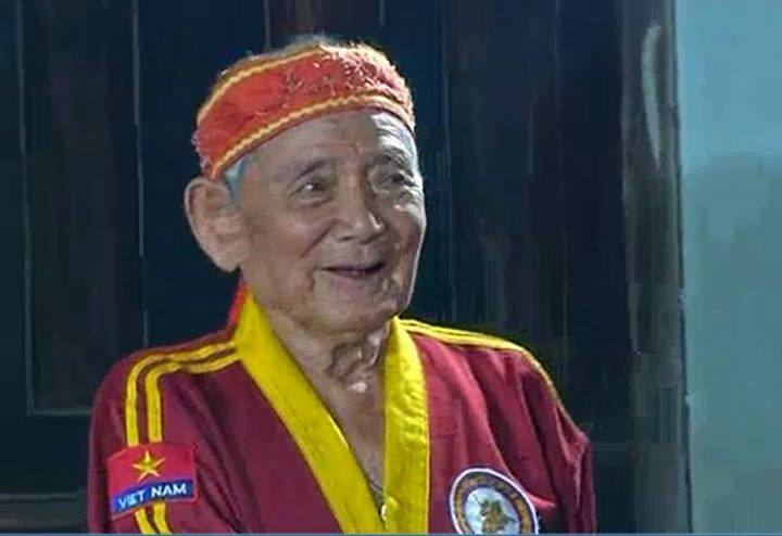 Võ sư Phan Thọ Tây Sơn